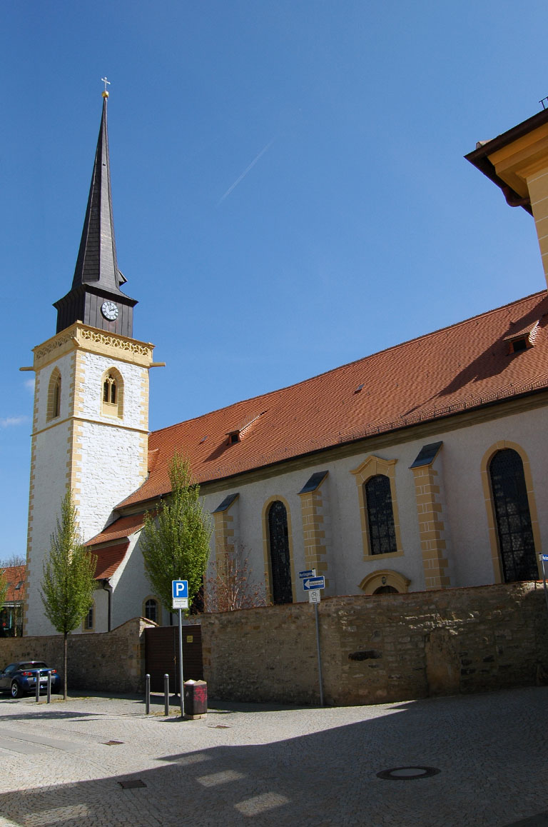 Martinikirche (erste Erwähnung 1265) in der Brühlerstraße in Erfurt